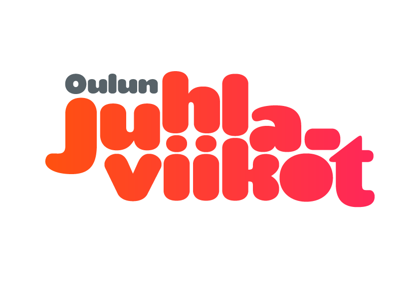 Oulun juhlaviikkojen logo